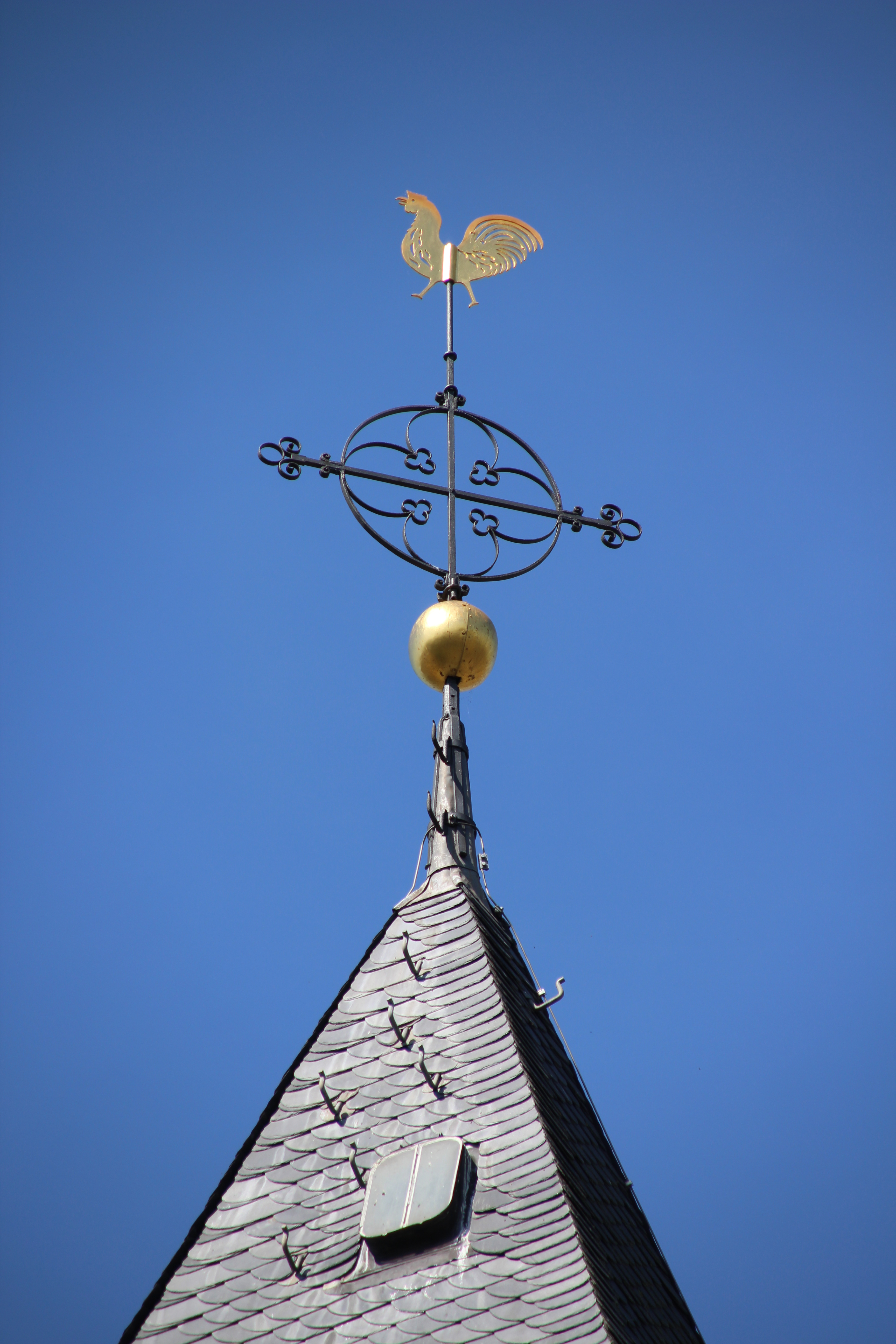 Turmkreuz der Kath. Pfarrkirche St. Mariä Himmelfahrt in Mariaweiler.